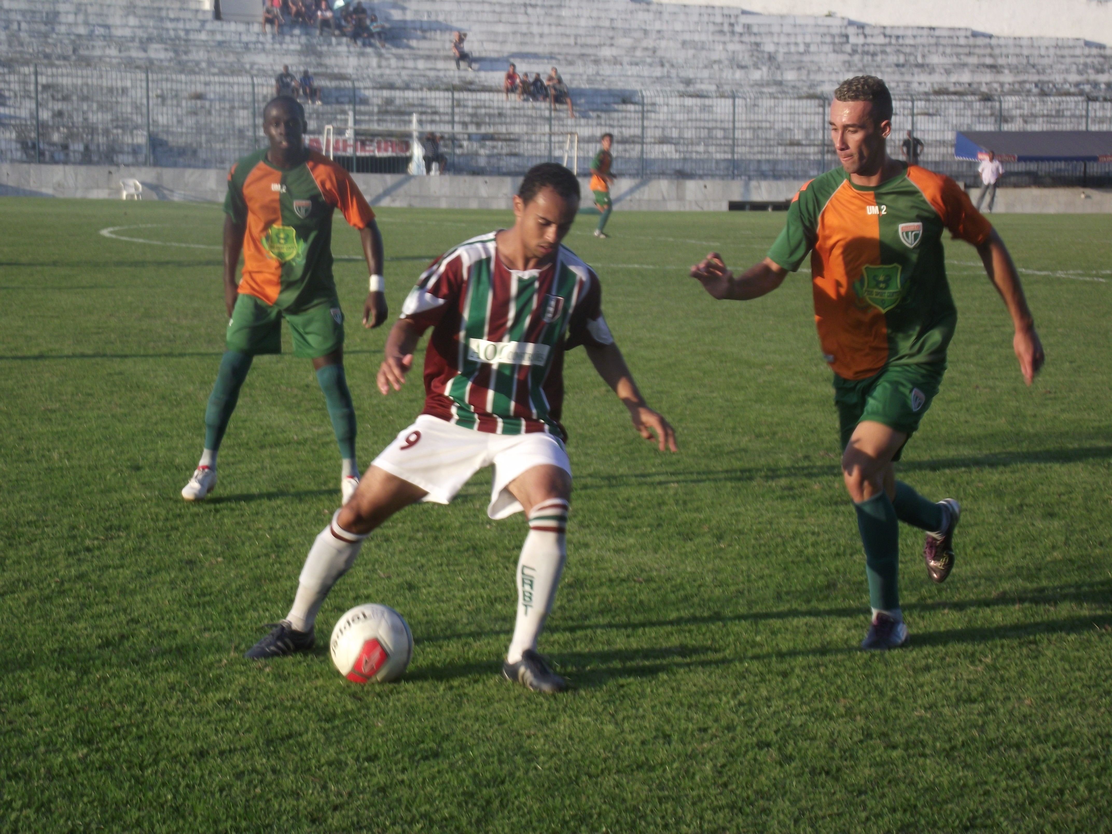 Nandinho disputa a bola com dois adversários do Villa Rio.